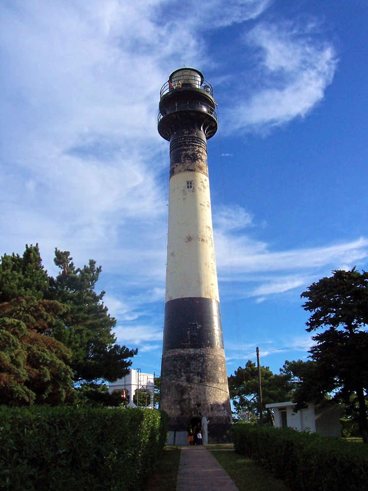 Faro ubicado en la localidad de Quequén, perteneciente al municipio de Necochea, provincia de Buenos Aires, Argentina.